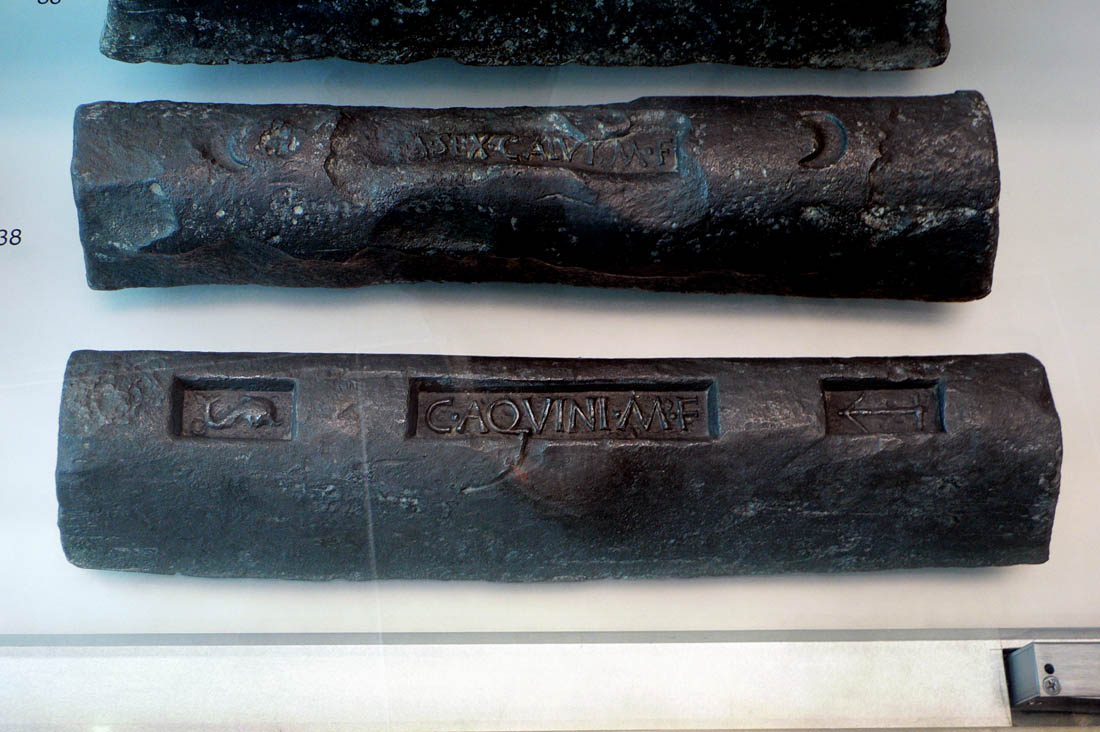 Lingotes de plomo de época romana, procedentes de las minas de Carthago Nova (Cartagena, España). Museo Nacional de Arqueología Subacuática de Cartagena (ARQUA). ELRH-SP 4: C(ai) Aquini M(arci) f(ilii).